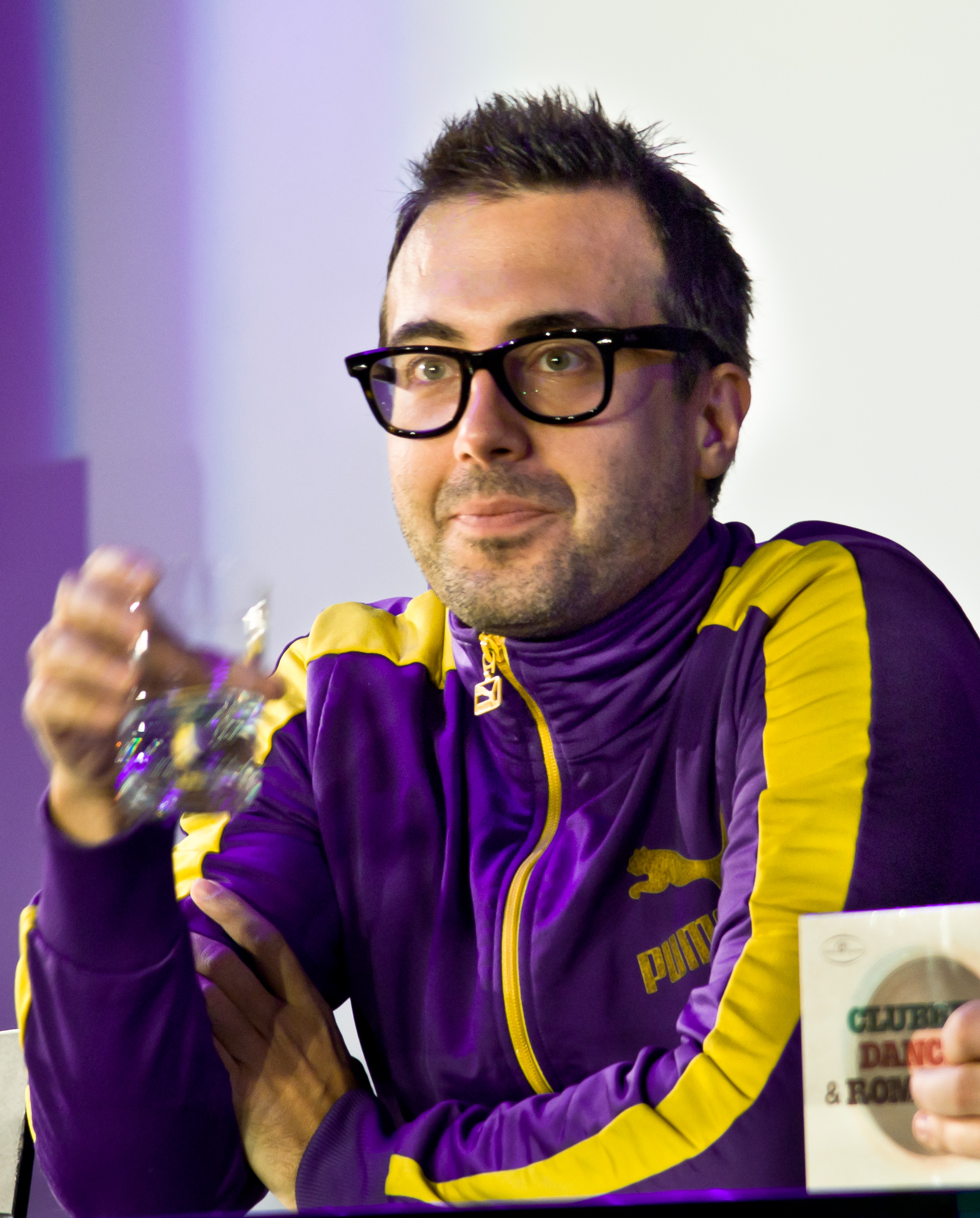 Adam Jaworski (DJ Adamus) podczas spotkania promocyjnego płyty „Polskie Nagrania – Clubbing, Dancing and Romanicing” duetu producenckiego Wet Fingers, 17 lutego 2012, Empik Junior, Warszawa